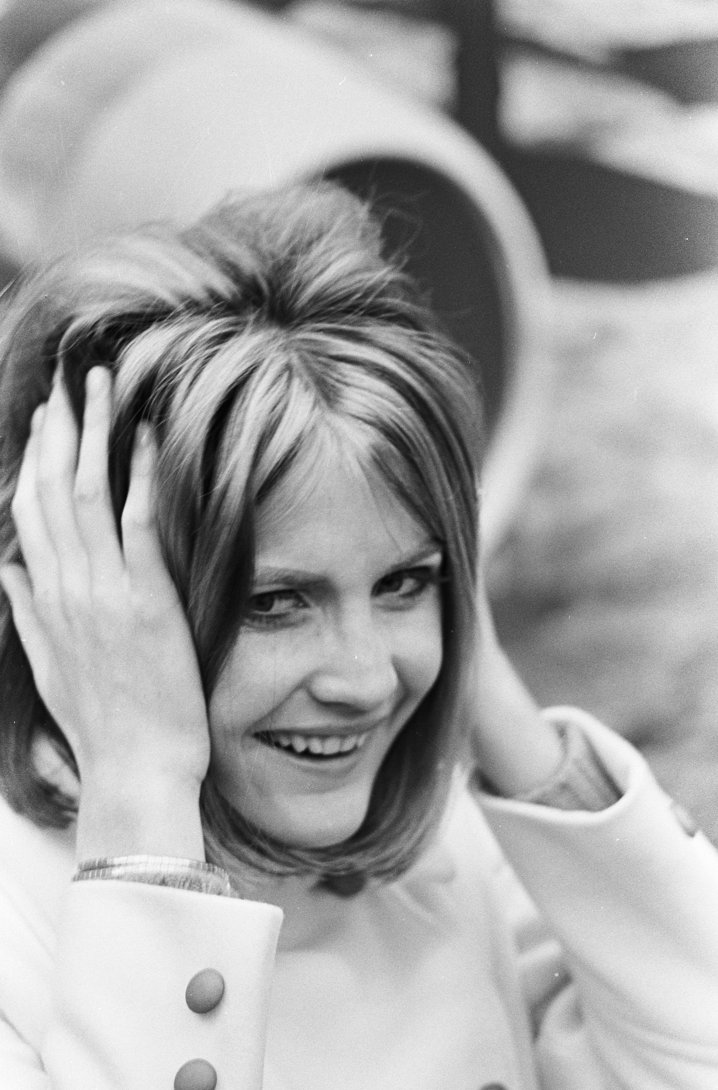 Collectie / Archief : Fotocollectie Anefo Reportage / Serie : [ onbekend ] Beschrijving : Aankomst zangeres Sandie Shaw op Schiphol Datum : 2 februari 1967 Locatie : Noord-Holland, Schiphol Trefwoorden : aankomsten, portretten, zangeressen Persoonsnaam : Shaw, Sandie Fotograaf : Kroon, Ron / Anefo Auteursrechthebbende : Nationaal Archief Materiaalsoort : Negatief (zwart/wit) Nummer archiefinventaris : bekijk toegang 2.24.01.05 Bestanddeelnummer : 920-0372 Reacties Geplaatst door Musicfan op 28 juni 2016 - 22:25. Zij was in Nederland voor t.v. opnamen voor het programma 'Twien'. De juiste schrijfwijze is Sandie Shaw